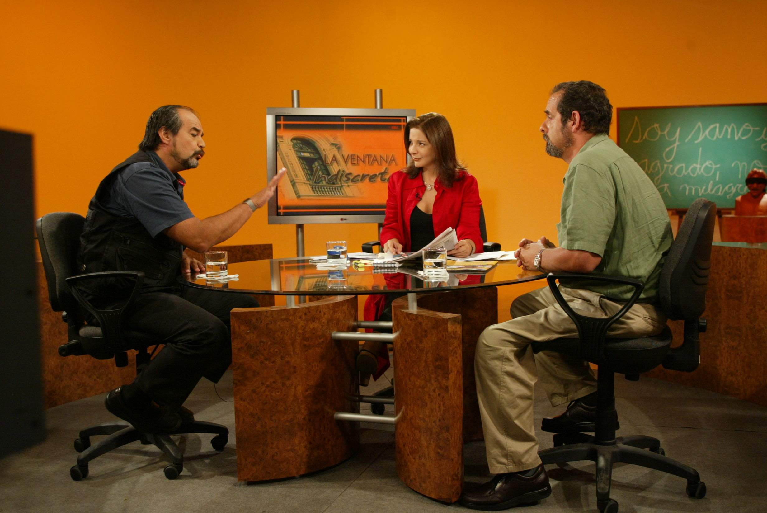 Entrevista a Mauricio Mulder y Javier Diez Canseco en el año 2005